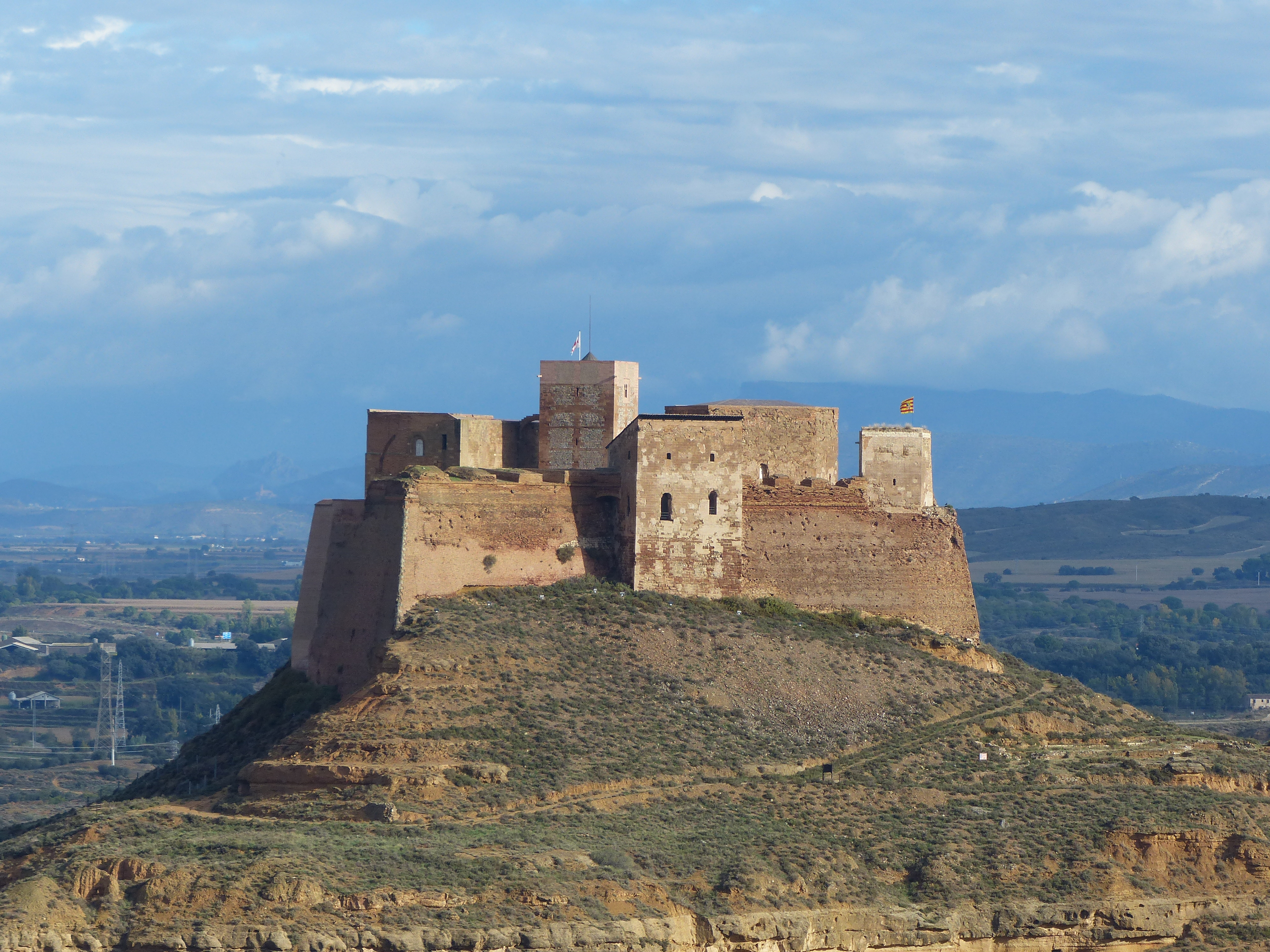 Monzón, provincia de Huesca, España.